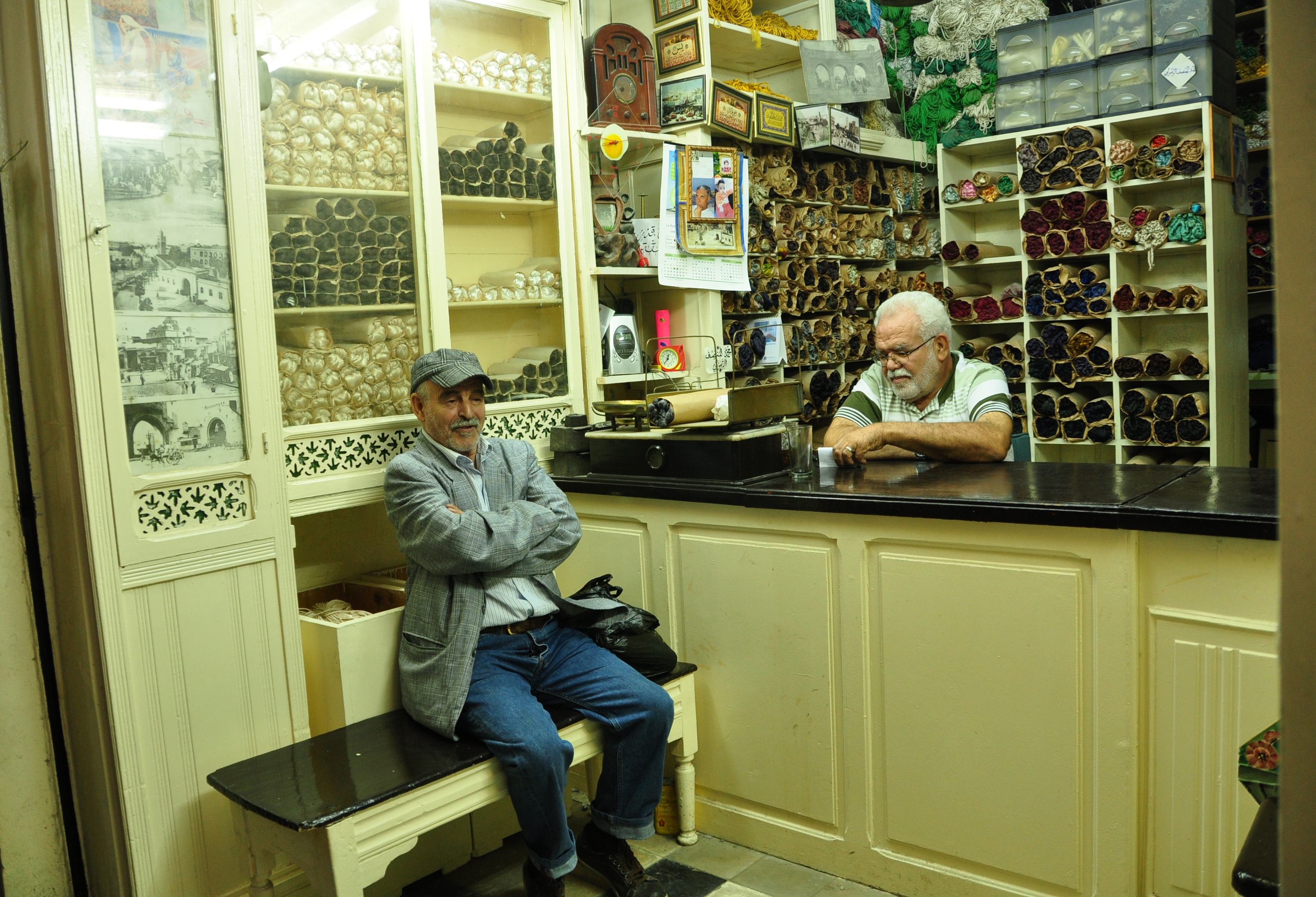 Souk kebabjia1